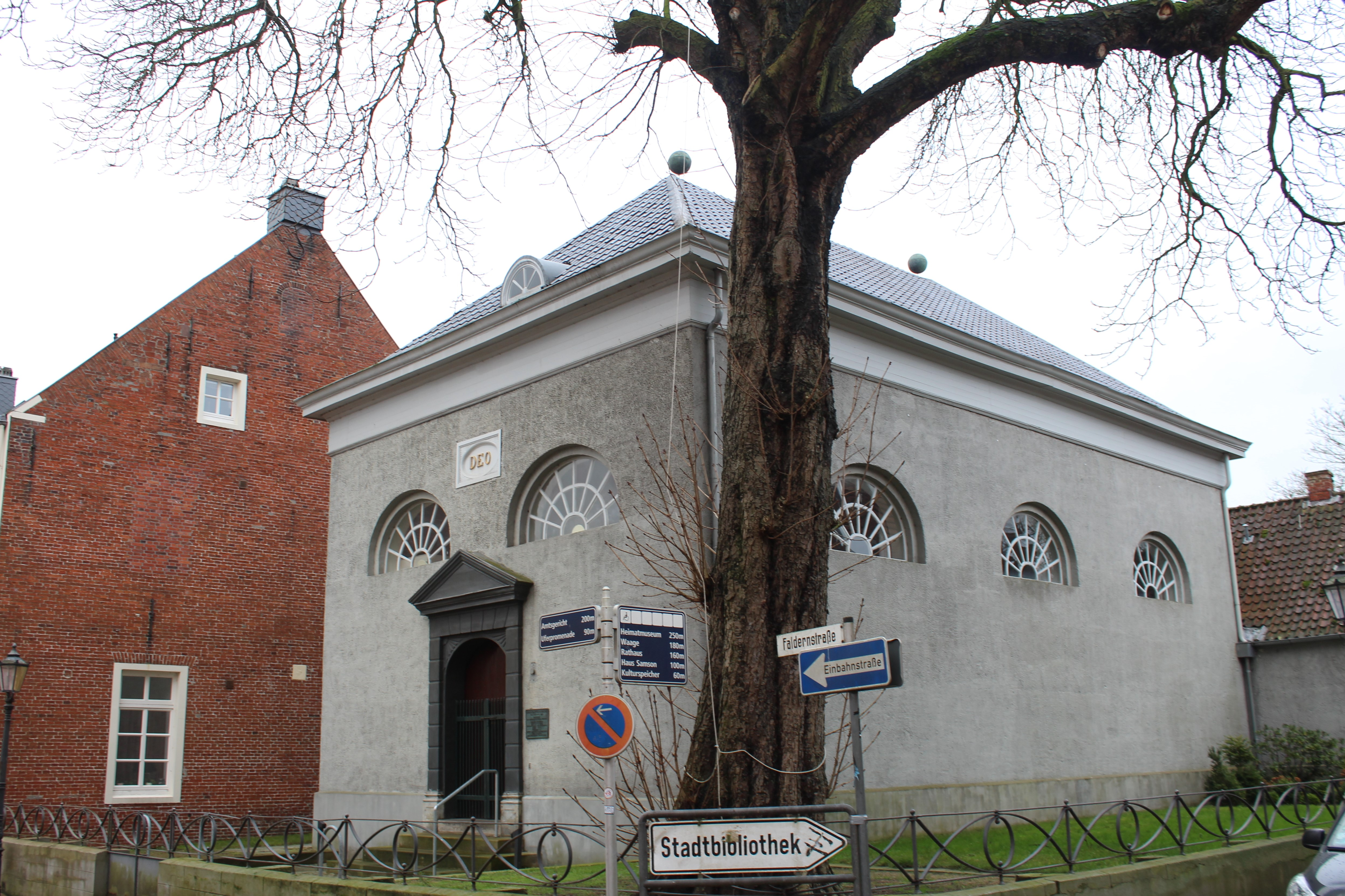 Mennonitenkirche, Leer (Ostfriesland), Niedersachsen, Deutschland